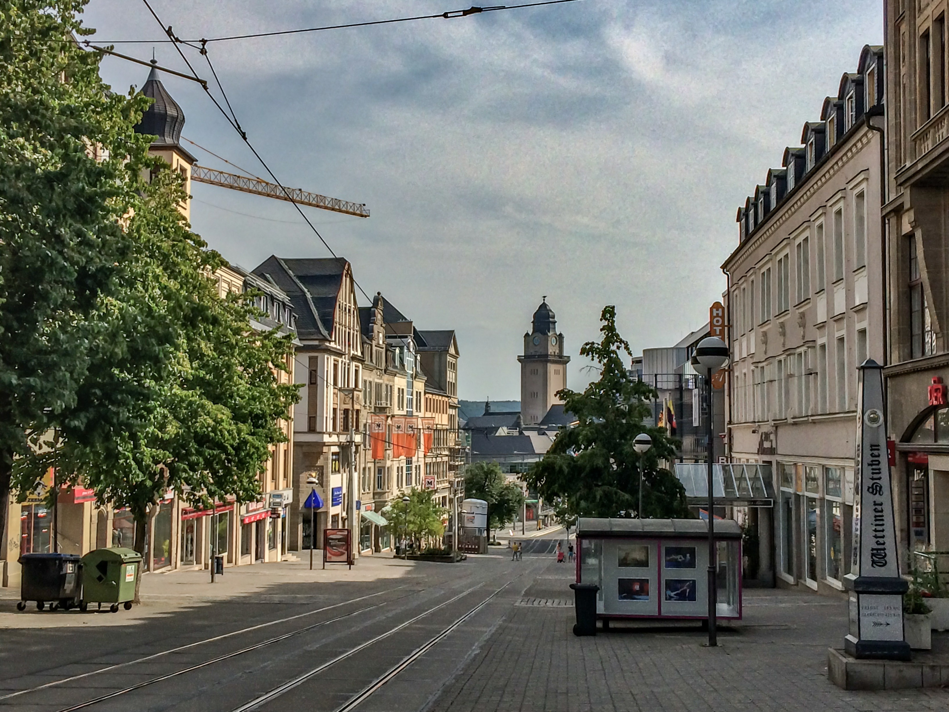 Plauen Innenstadt Bahnhofstrasse, Juli 2014